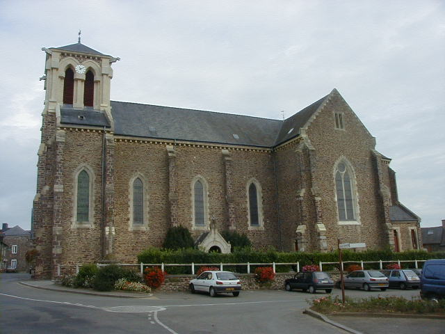 Eglise Talensac